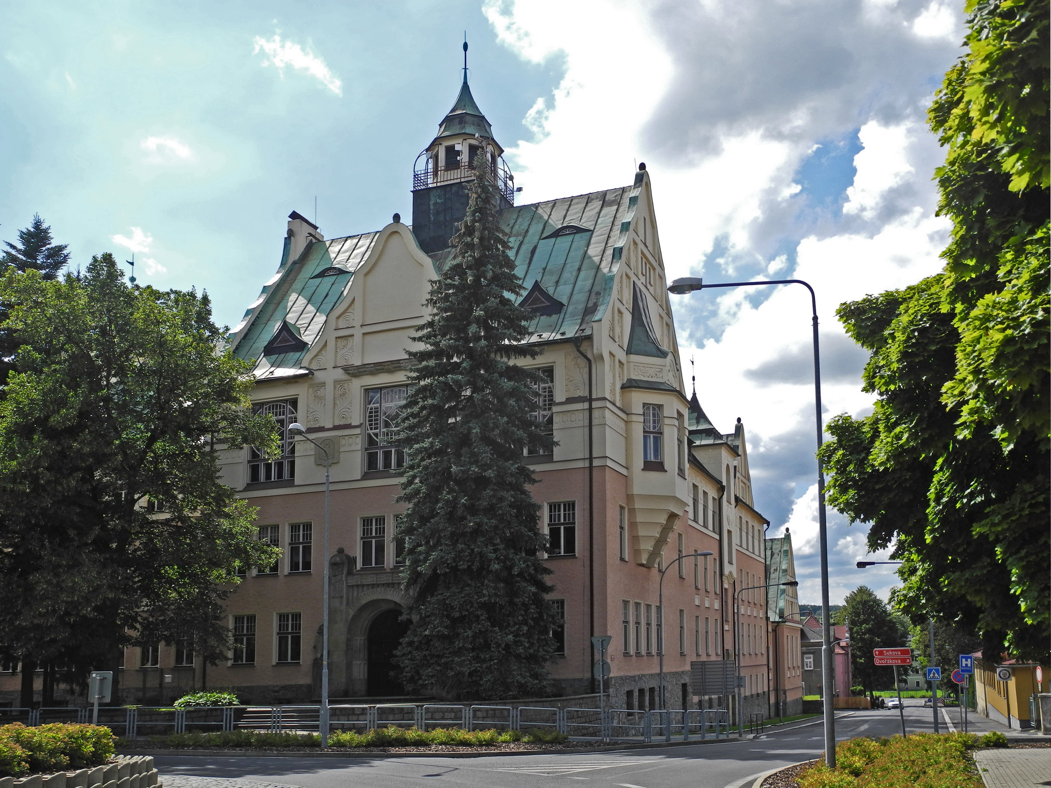 Gymnasium in Rumburk (Rumburg), Komenského 10. Architekt: Ernst Schäfer (1906).